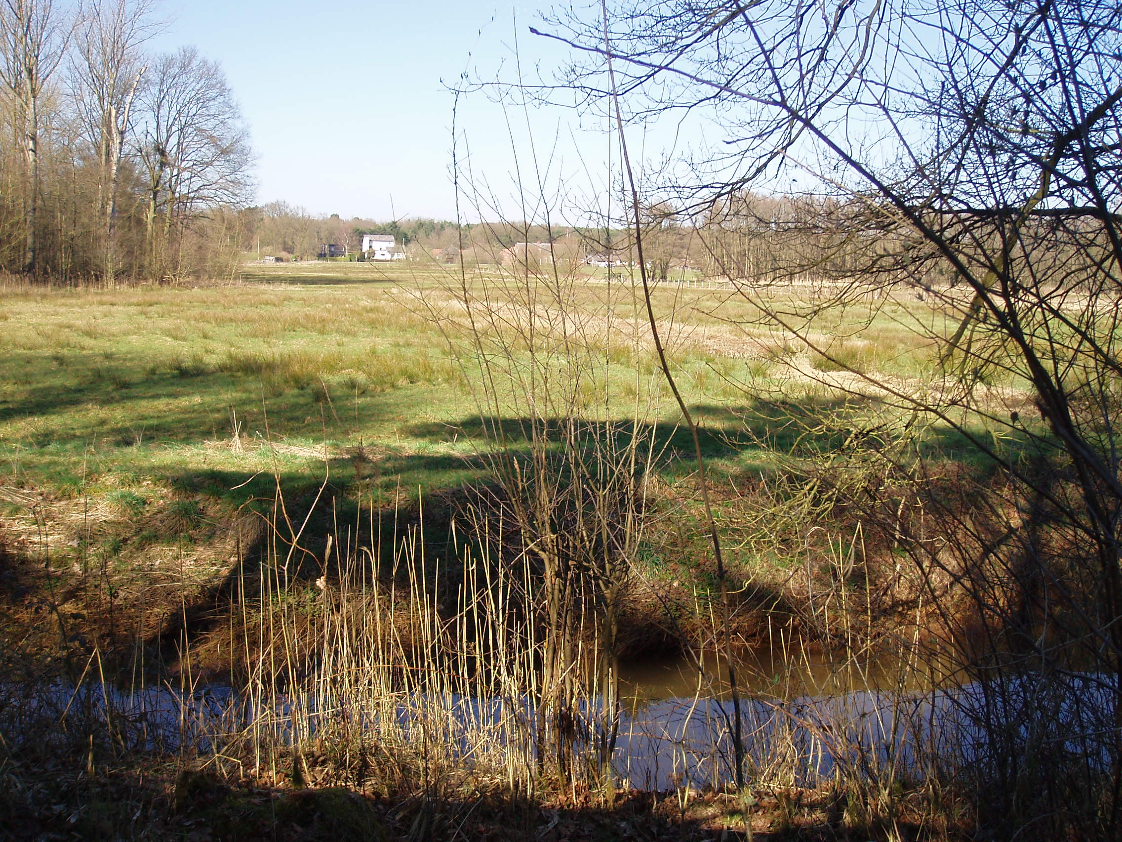 Het Goor, deel van het domein Vrieselhof